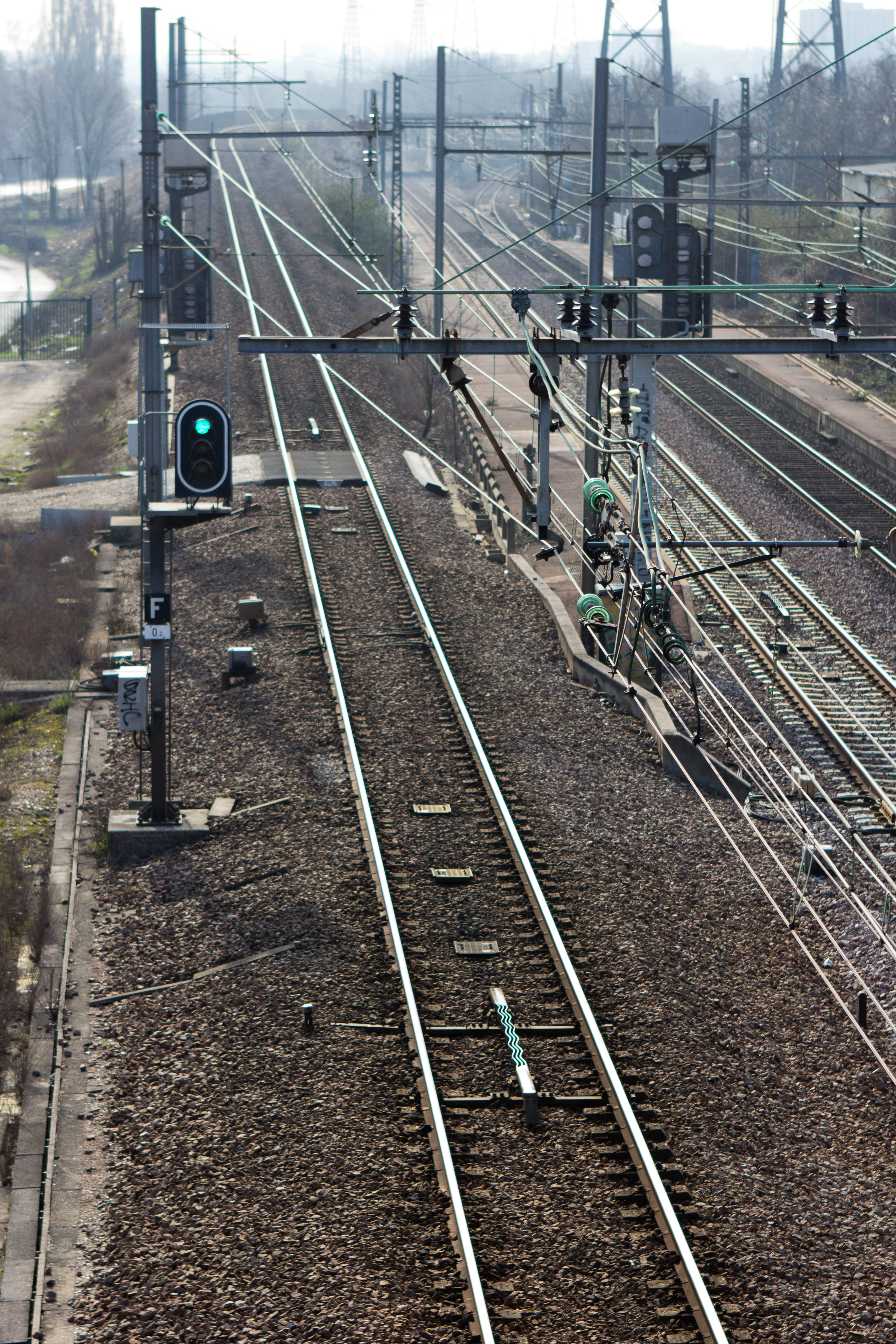 Ancienne gare de Grigny-Val-de-Seine vue depuis le nord, ligne de Villeneuve-Saint-Georges à Montargis, Grigny, Essonne, France